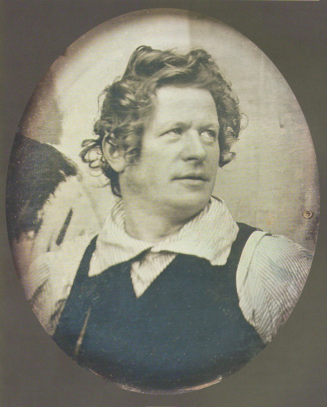 в Эрмитаже выставка «Эпоха дагеротипа. Ранняя фотография в России»